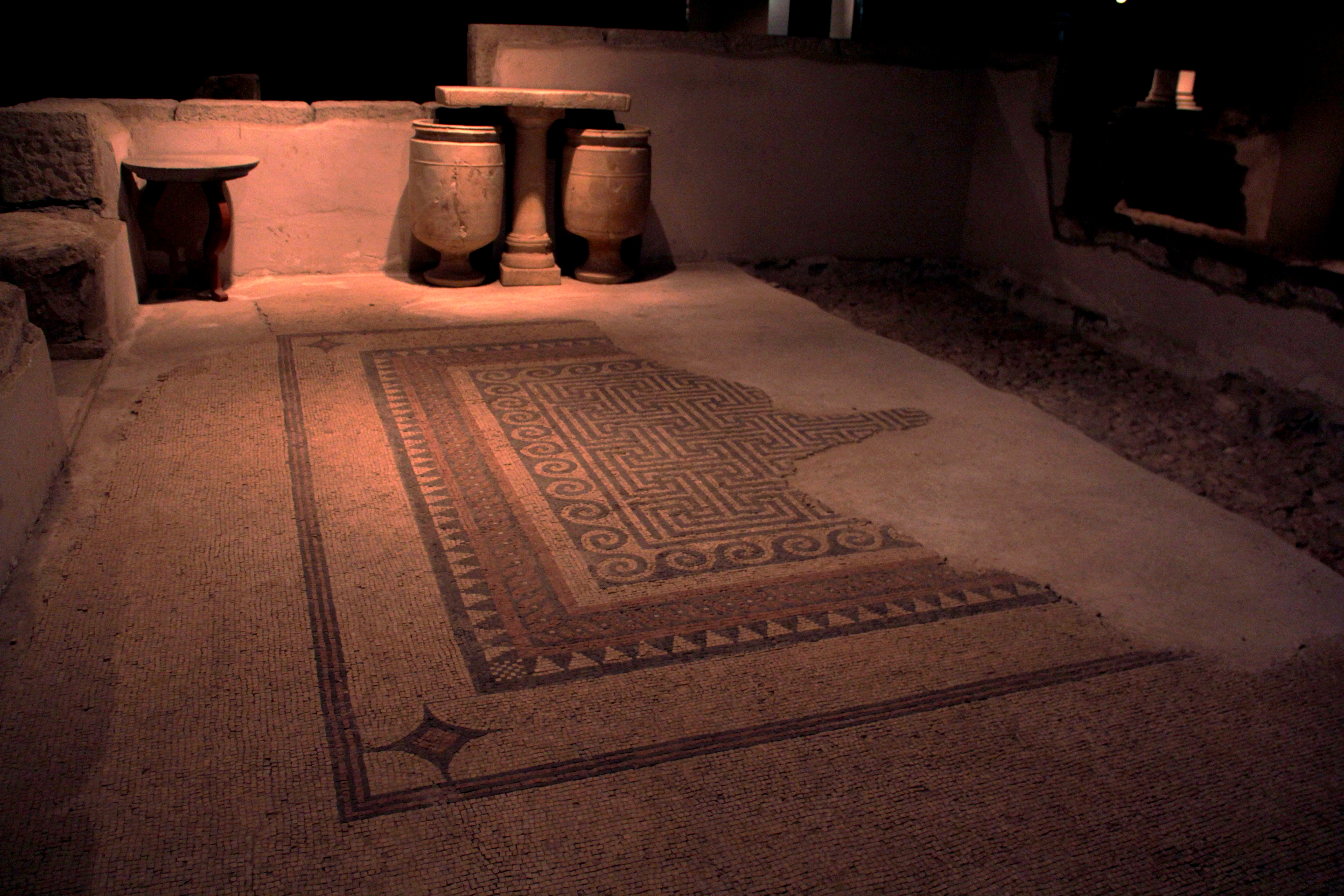 מוזיאון וואהל לארכאולוגיה - הפרוור ההרודיאני הוא מוזיאון ברובע היהודי בעיר העתיקה בירושלים אשר נבנה על שרידיהם של בתי פאר מ(העיר העליונה בימי המלך הורדוס ומציג בין היתר מקוואות, פסיפסים, כלי בית וחפצי אמנות בני התקופה.